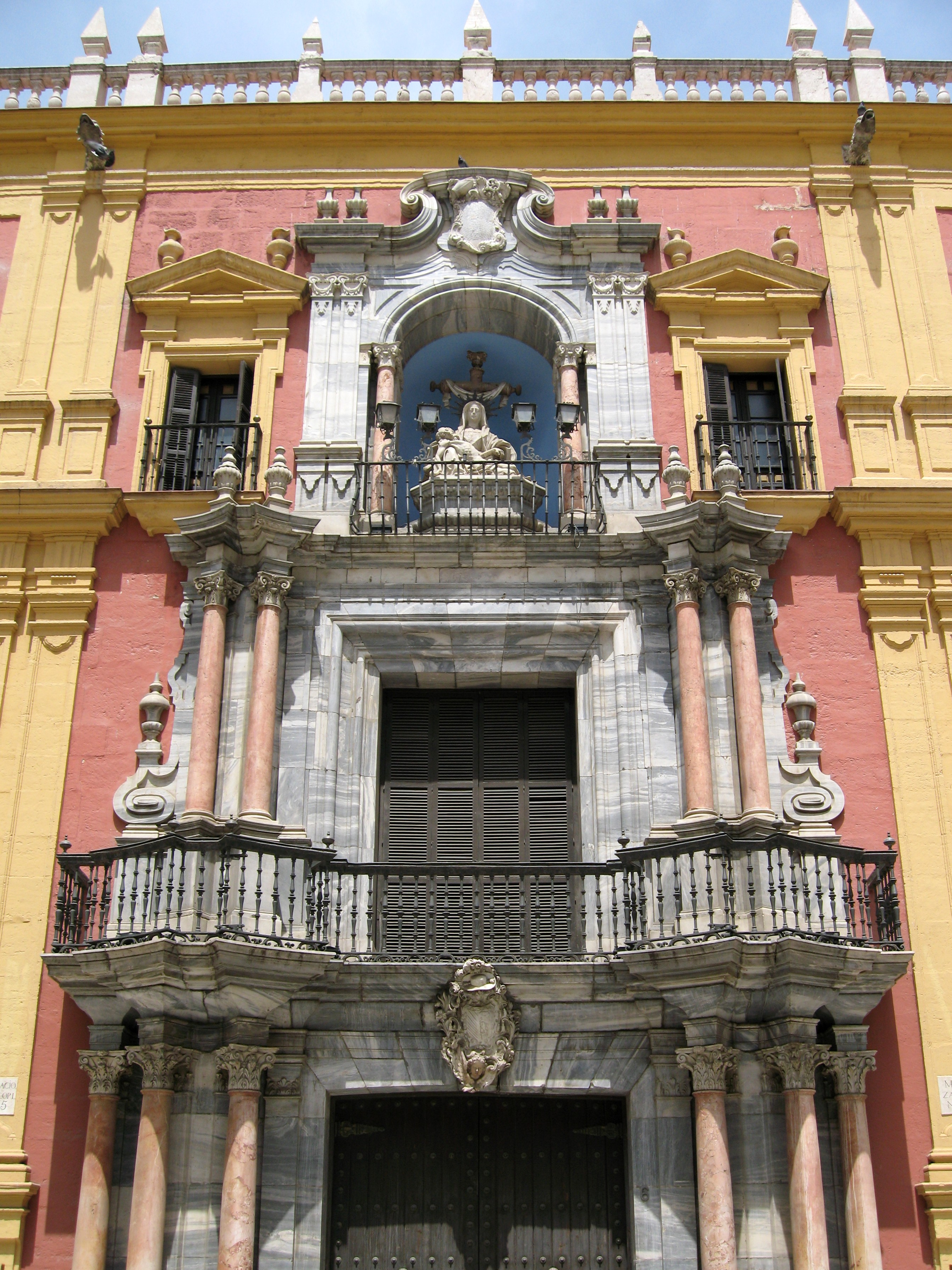 Bischofspalast (Palacio Episcopal) in Málaga, Andalusien, Spanien